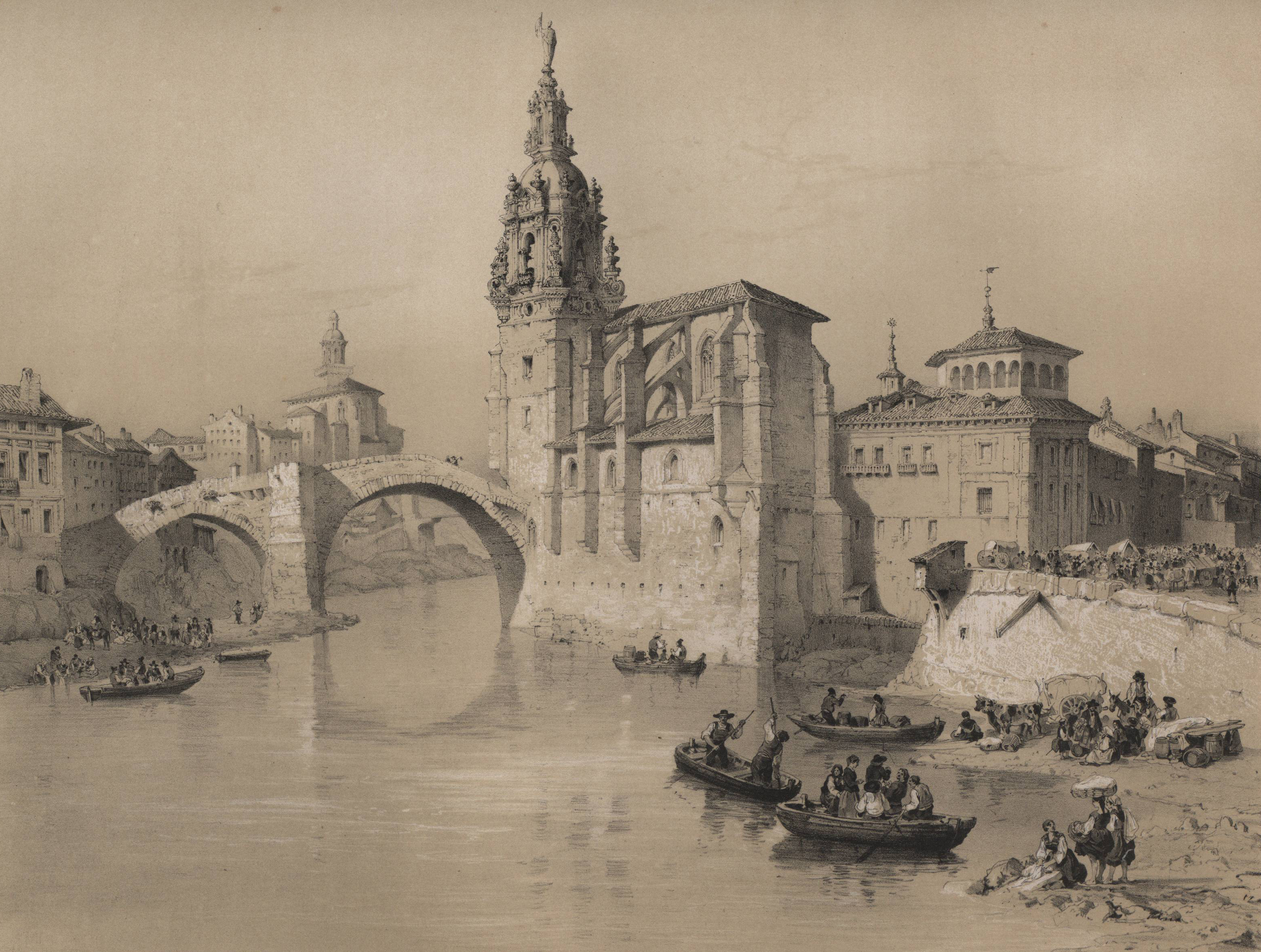 Yglesia de San Antonio Abad en Bilbao.